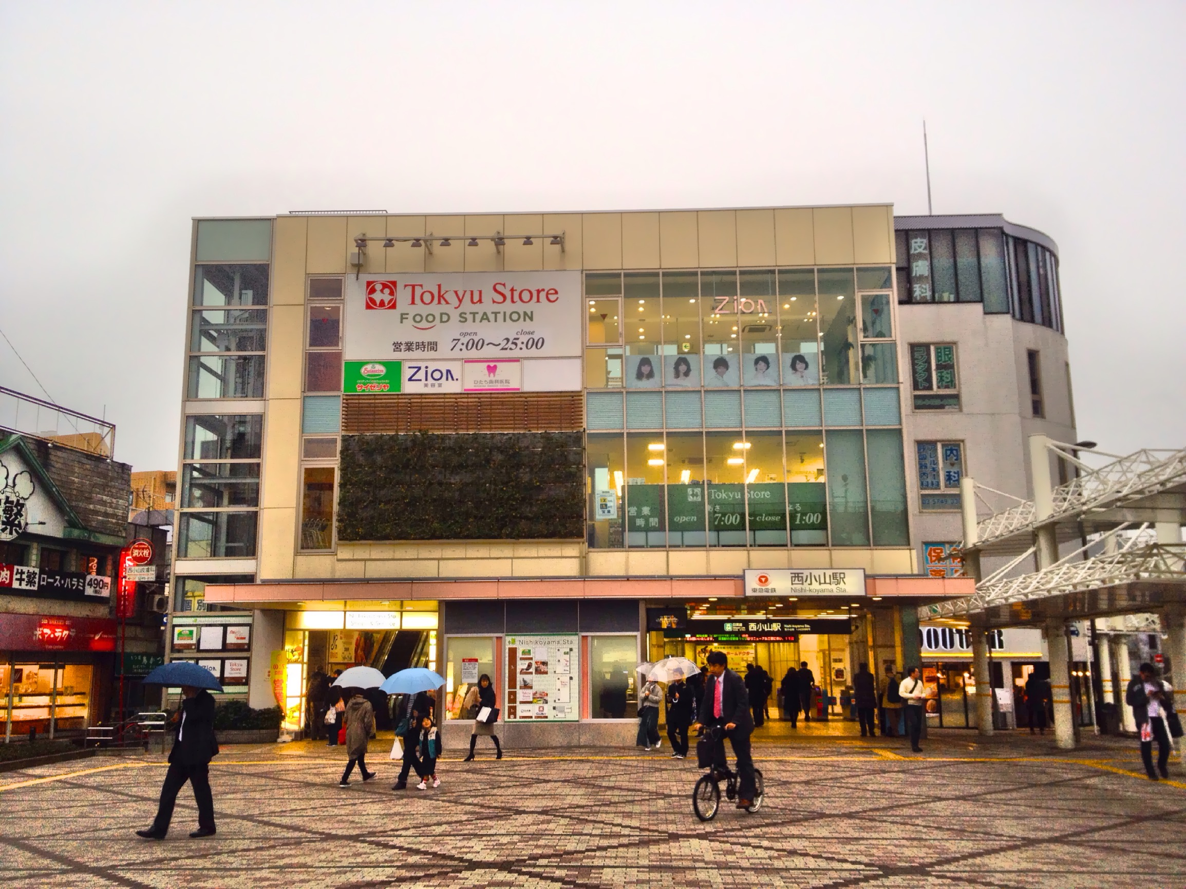 西小山駅 (Nishi-koyama station)